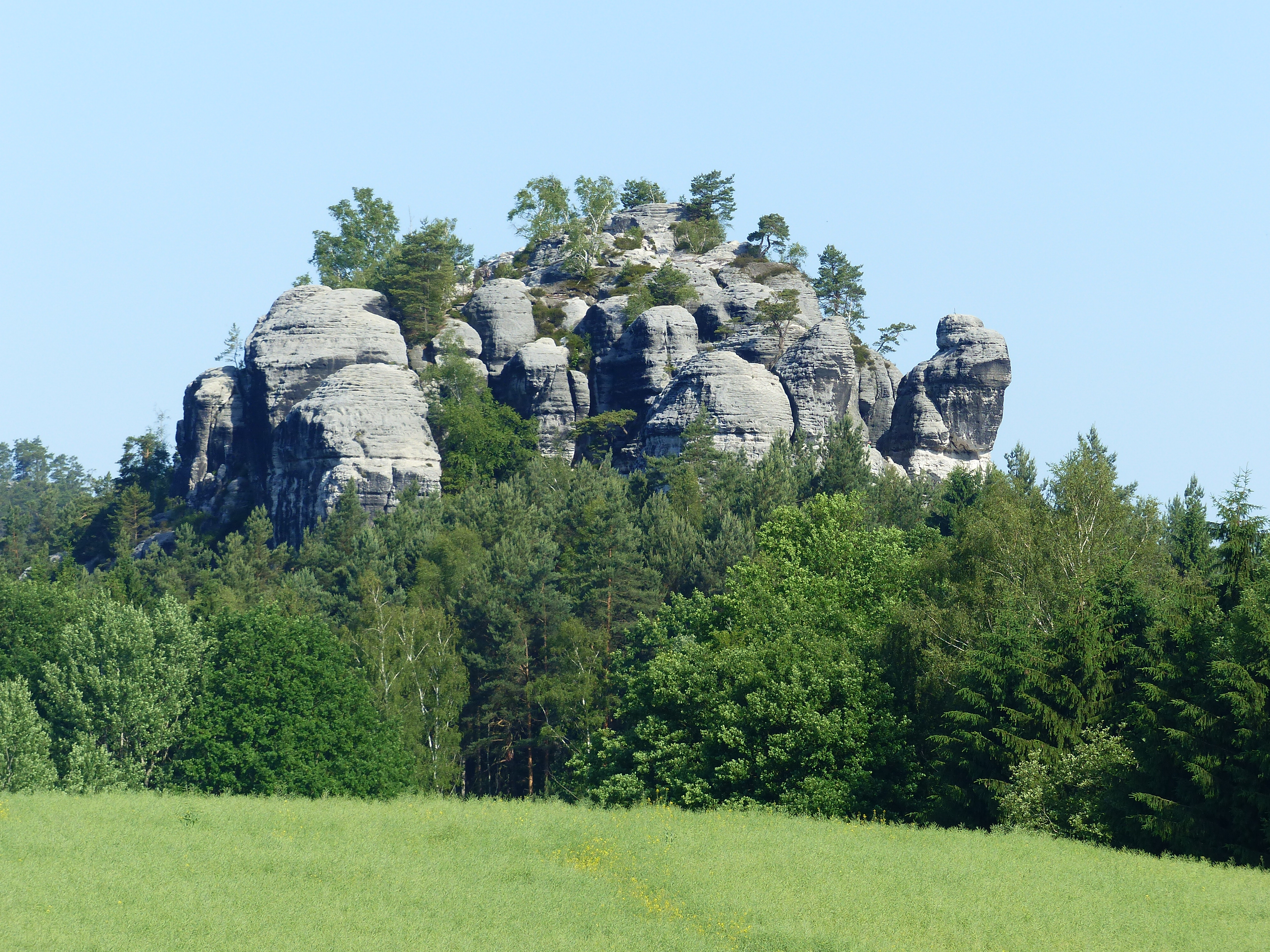 Blick auf den Gamrig von "Walterdorfer Berg" aus, nahe Rathen, im Nationalpark Sächsische Schweiz